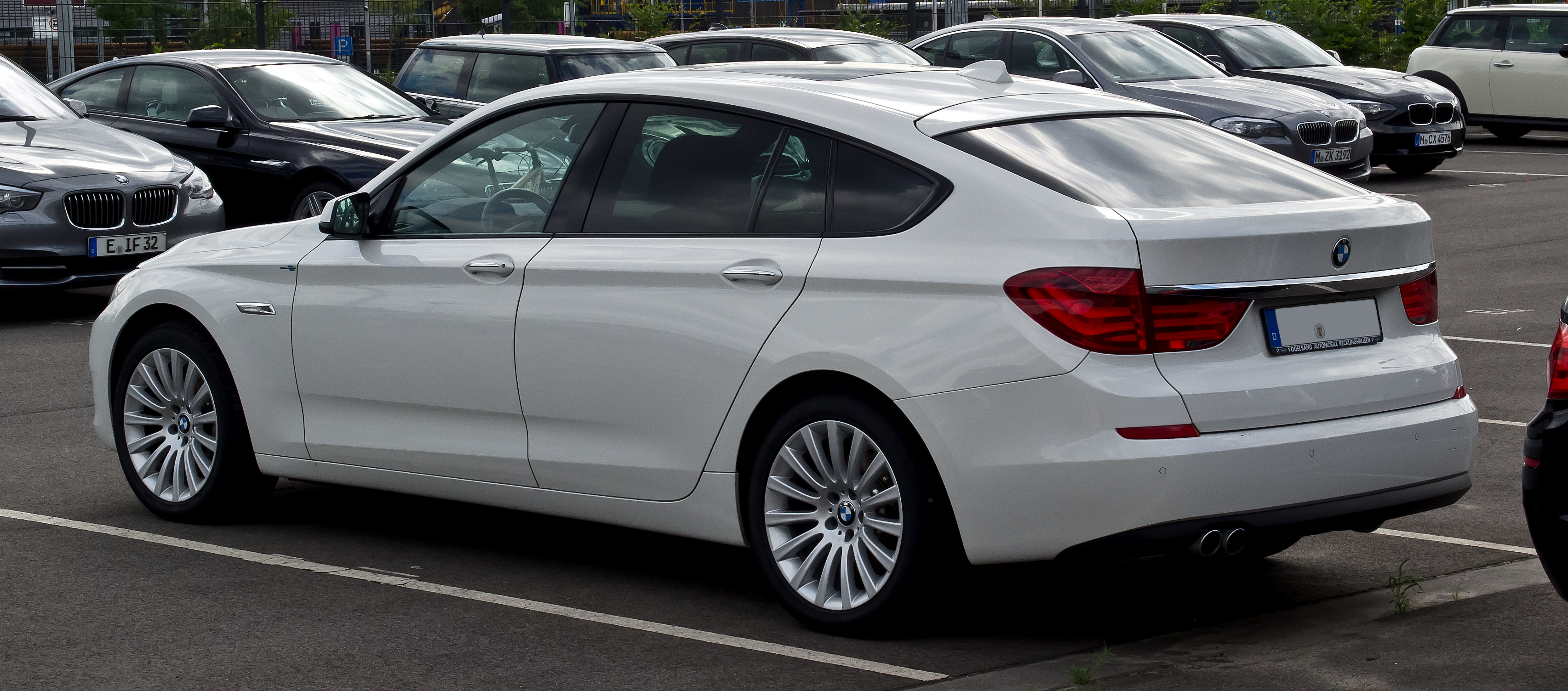 BMW 5er GT (F07)